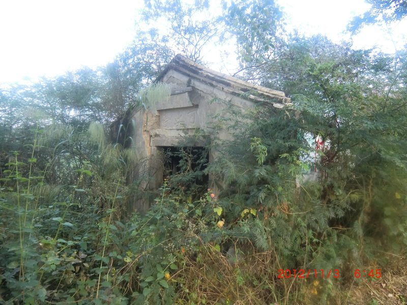 中文（中国大陆）: 莲花山可止亭